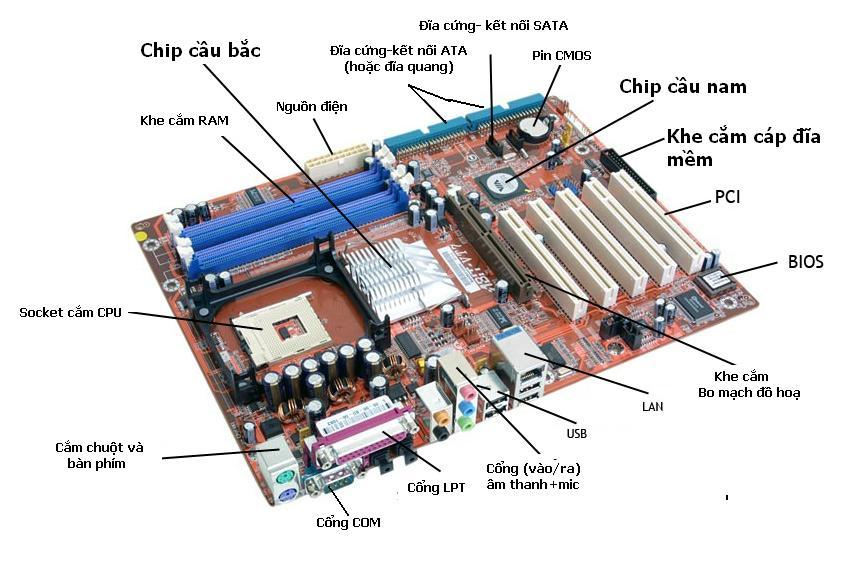 Chú thích cho bo mạch chủ